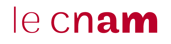 Logo du Conservatoire national des arts et métiers (Cnam)